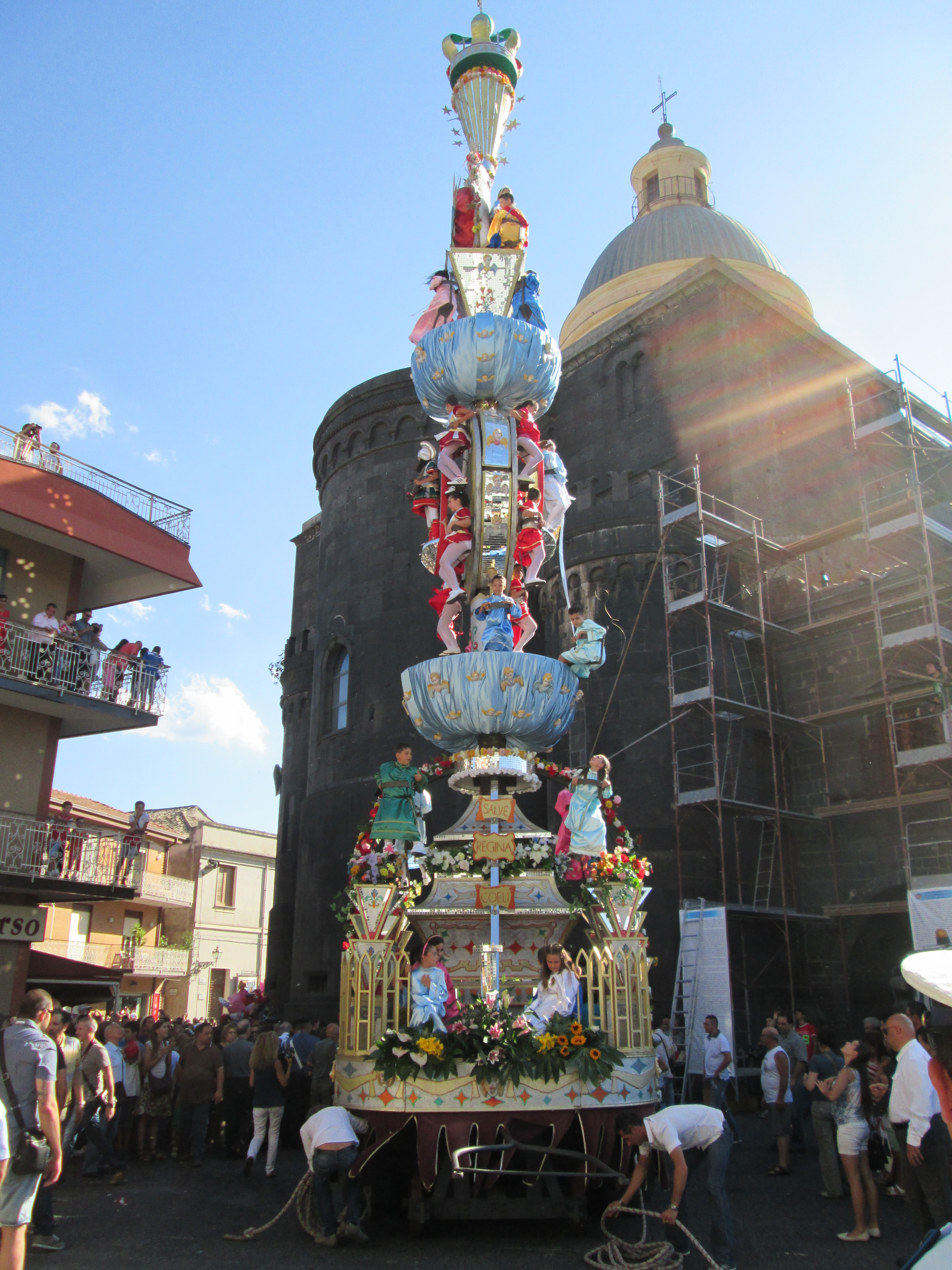 La "Vara" di Randazzo (CT) è un carro trionfale, alto 18 metri, che rappresenta l'Assunzione di Maria al cielo.